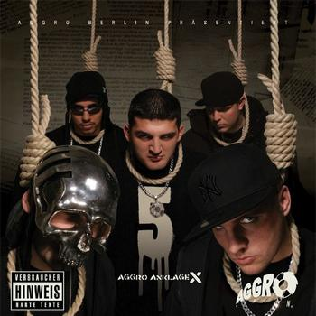 Cover des Samplers „Aggro Ansage Nr. 5X“